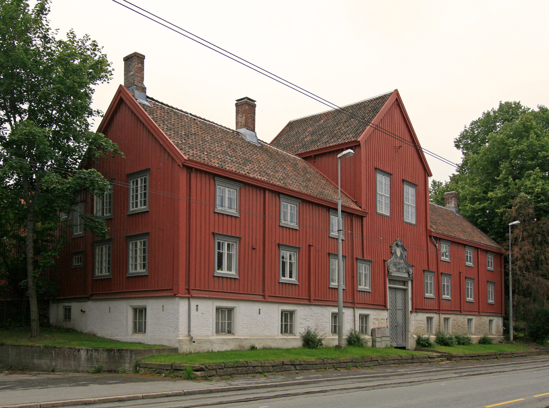 Thomas Angells Stuer, Kongens gate 91, Trondheim. Bygd 1770; arkitekt Heinrich Kühnemann.